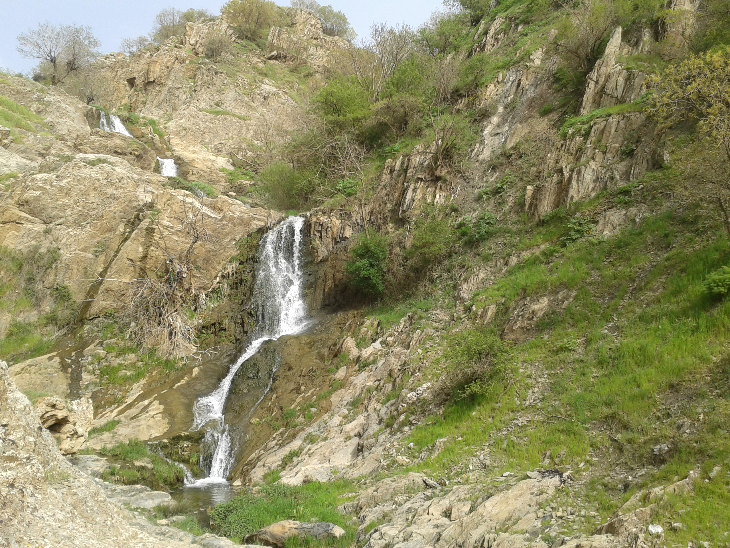 کوردیی ناوەندی: تاڤگەی سێف، مەریوان، کوردستان